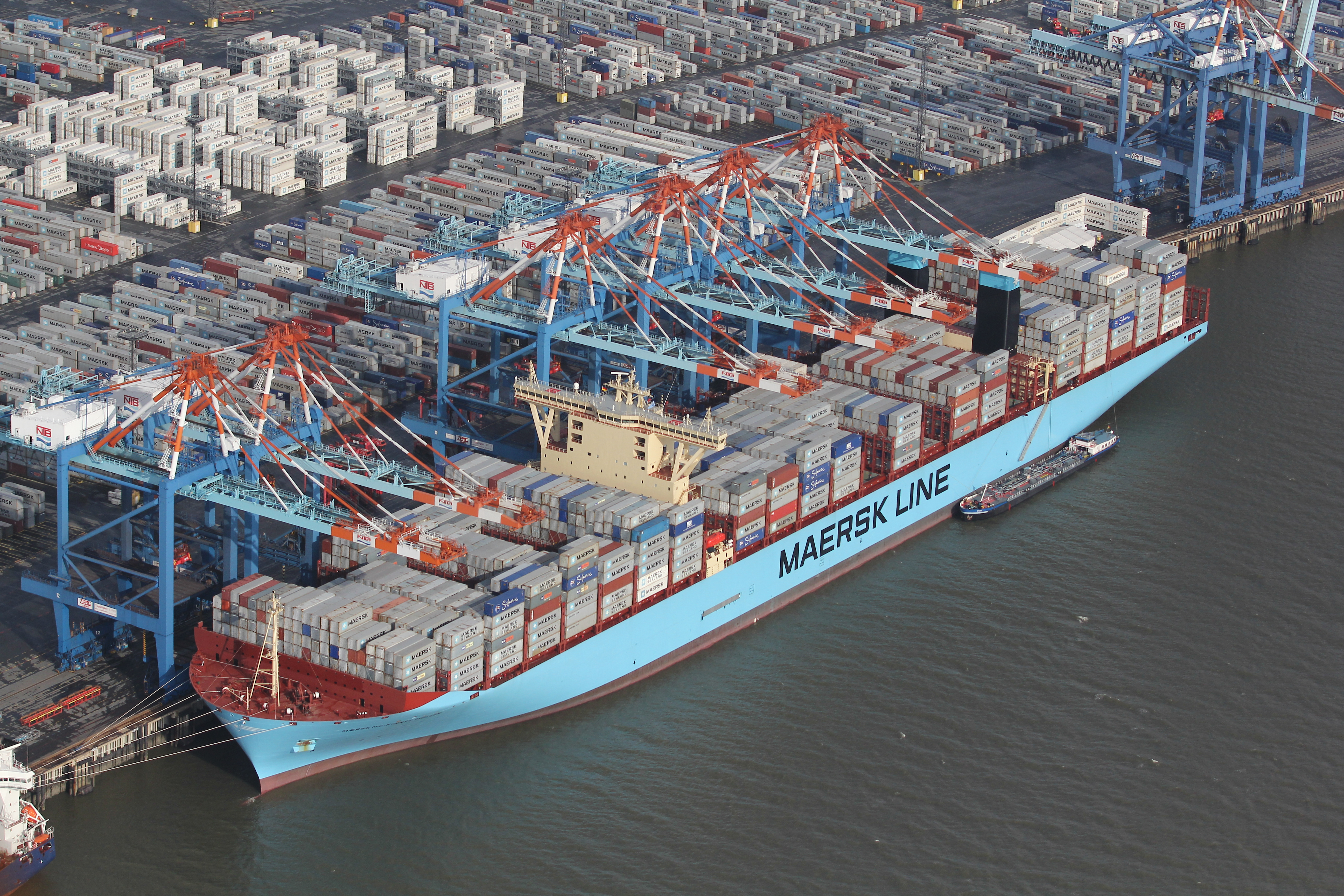 „Maersk Mc Kinney Möller" maiden call Bremerhaven 2013-08-18